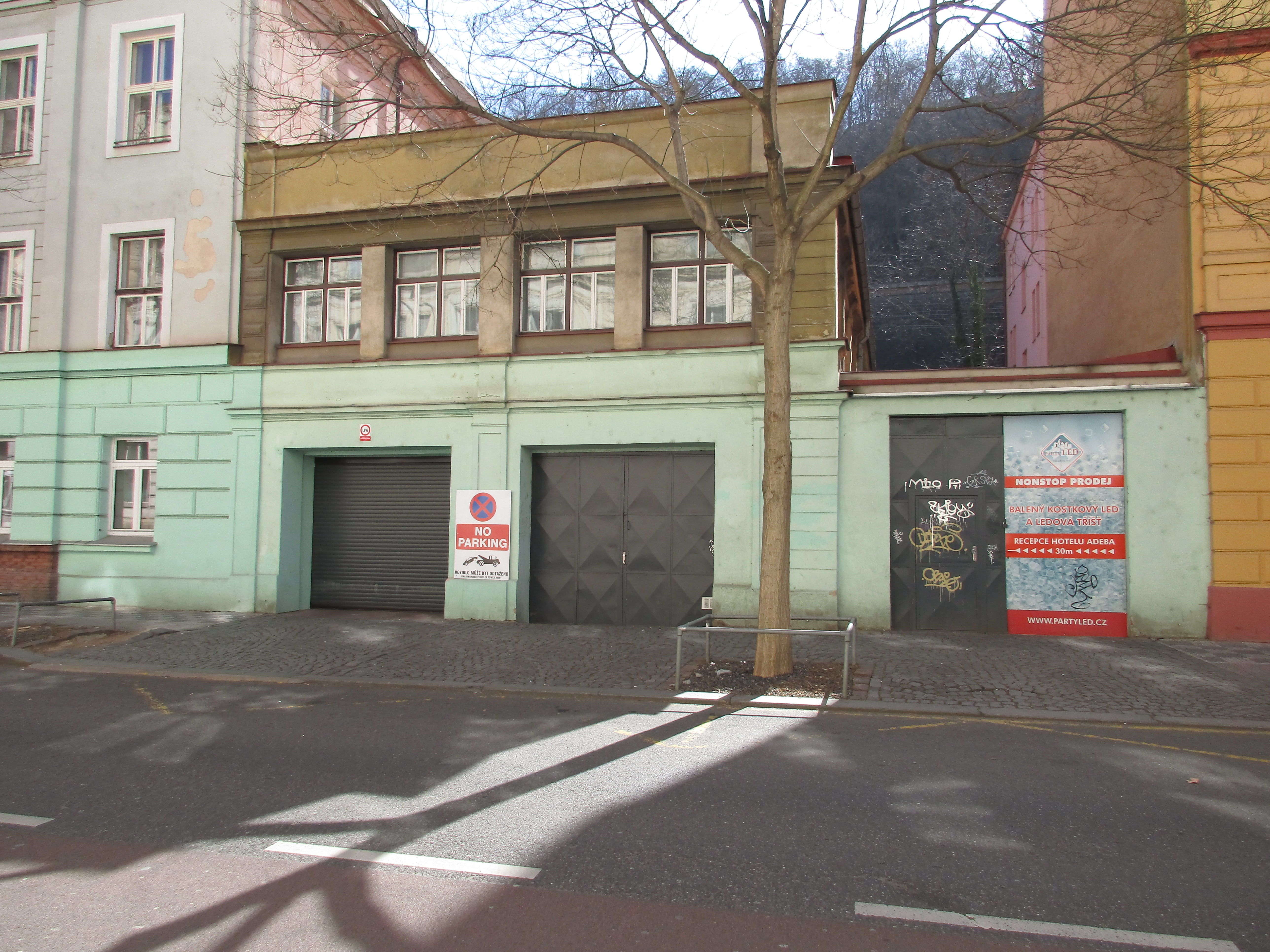 Pernerova 653 - přístavba nájemního a obchodního domu firmy Müller & Söhne, později firma Hanzík a Vodička.